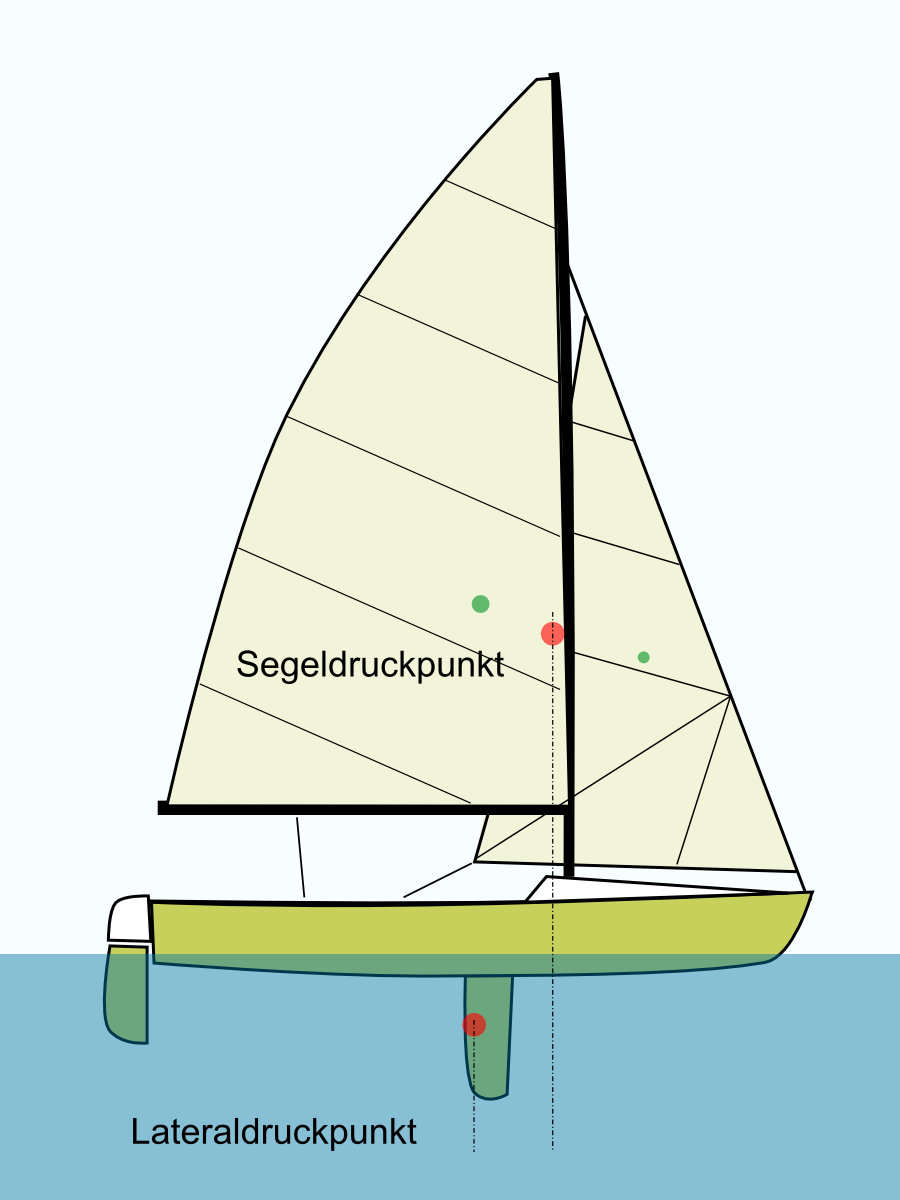 Jolle Seitenriss, Dinghy Draft